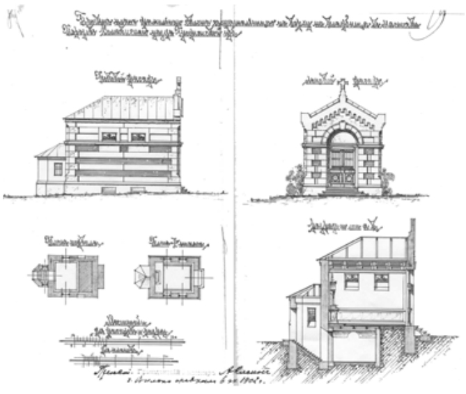 Беларуская (тарашкевіца): Поразаў (Porazaŭ), капліца-пахавальня Бутаўт-Андрайковічаў (Butaŭt-Andrajkovič)